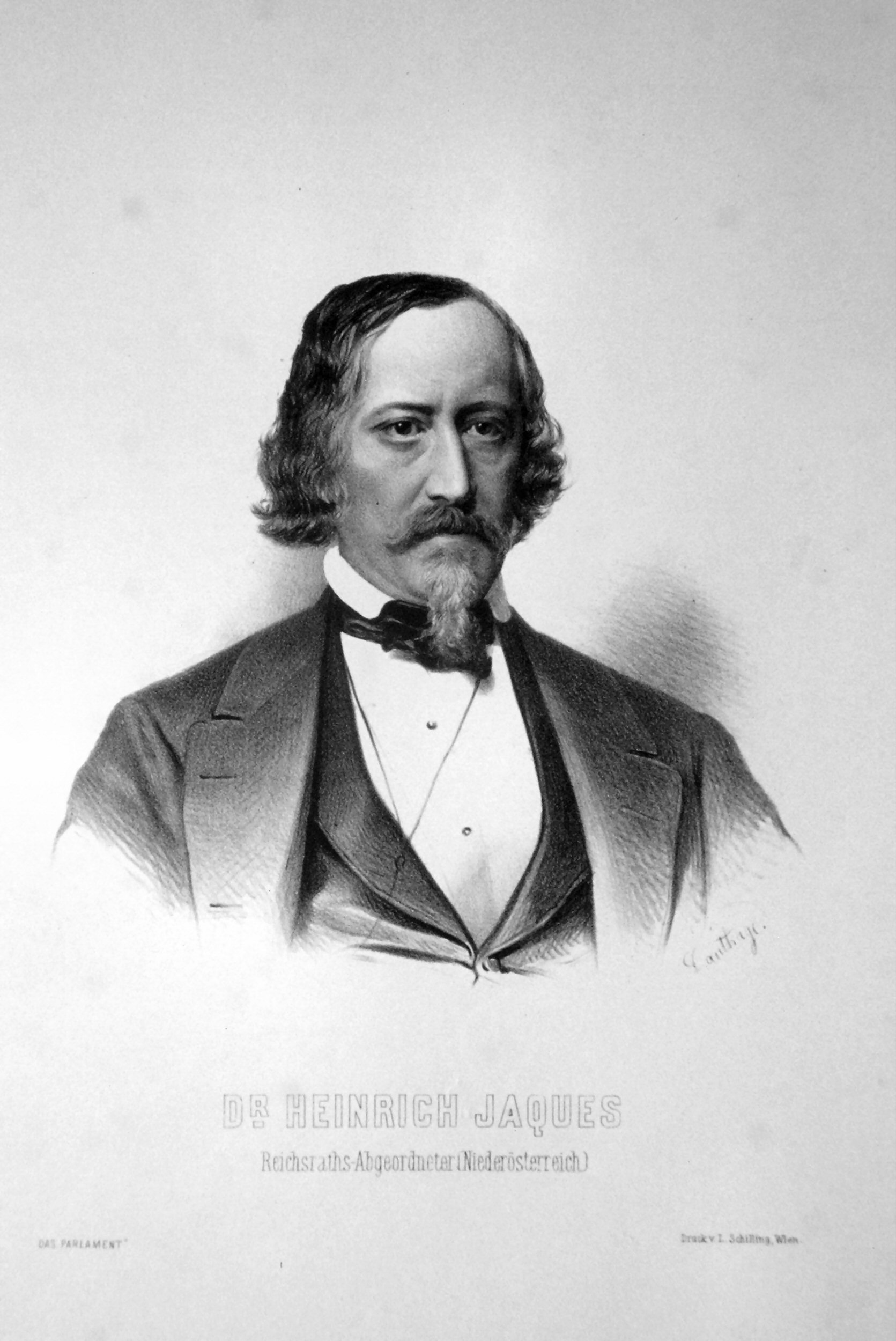 Heinrich Jaques (1831-1894), Dr. jur. Abgeordneter zum Land- und Reichstag. Lithographie von Adolf Dauthage, ca. 1870.